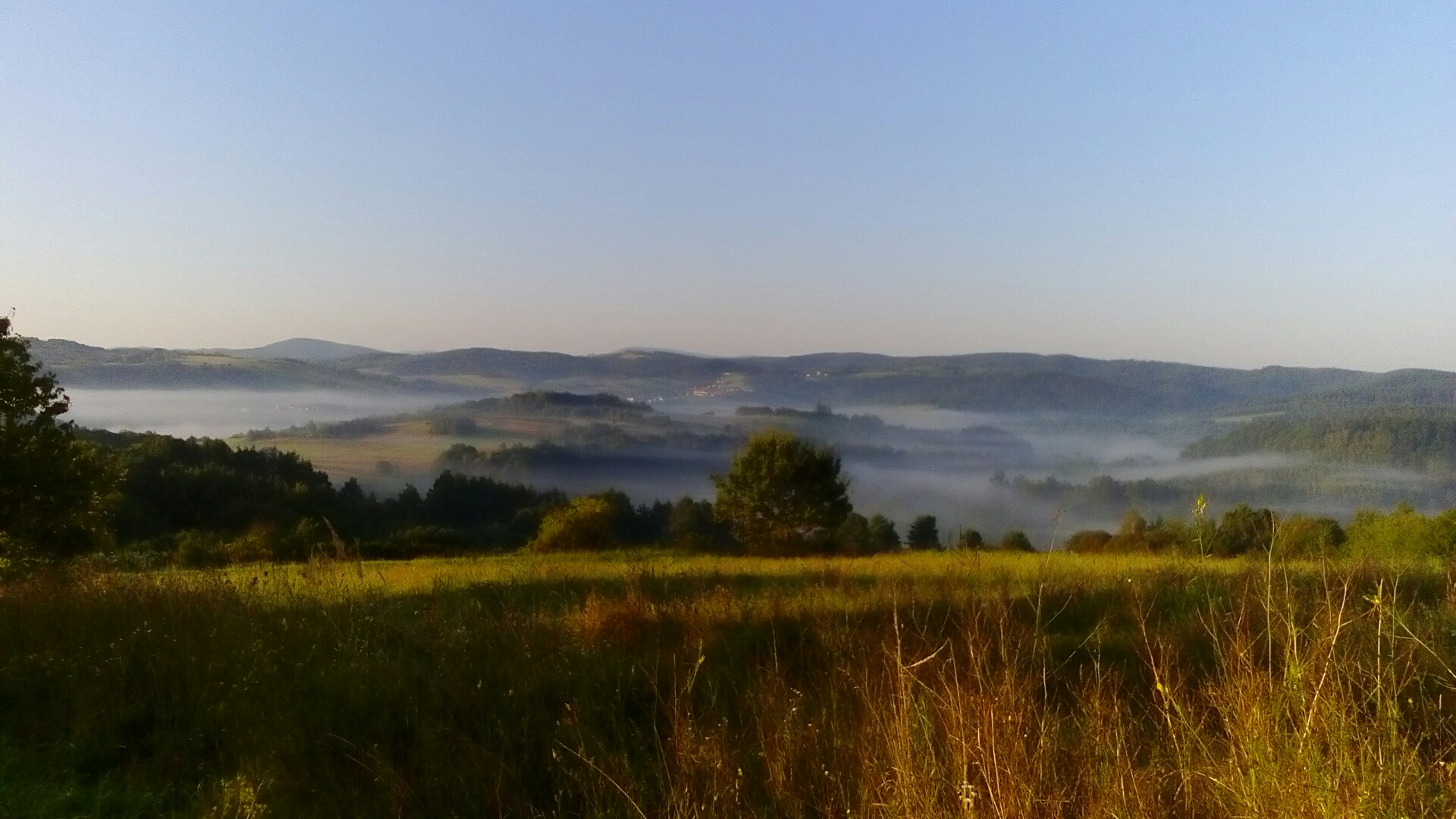 Mgła nad rzeką Osława w rejonie Czaszyna